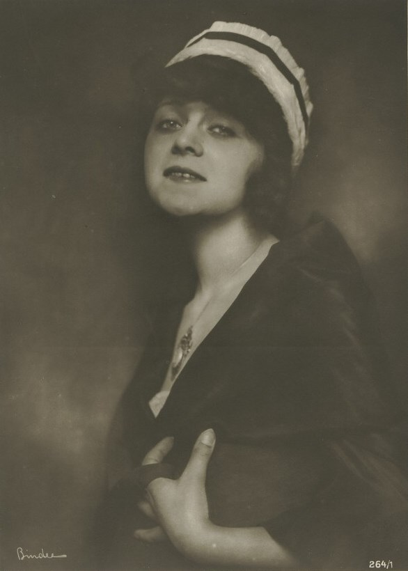 Porträt der belgischen Schauspielerin Ria Jende auf einer Fotografie von Alexander Binder